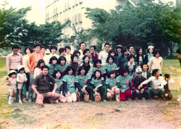 上尾中央総合病院ソフトボール部 1971年（昭和46年）当時（上尾メディックス 記事中の説明より転記）